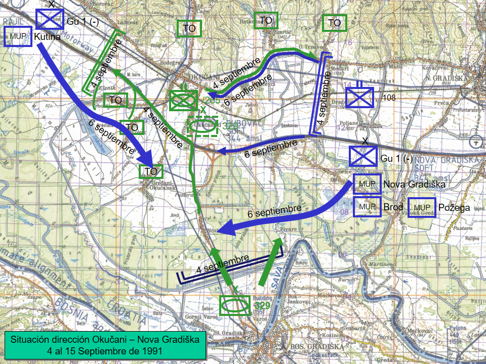 Martinić Jerčić, Natko (2014-12-11). «Oslobodilačke operacije hrvatskih snaga u Zapadnoj Slavoniji u jesen i zimu 1991./1992. godine» [Operaciones de liberación de las fuerzas croatas en Eslavonia occidental en el otoño y el invierno de 1991/1992]. Tesis doctoral (en croata) (University of Zagreb. Department of Croatian Studies.). Simić, Krunoslav (2013). «Prikaz novogradiškog bojišta u dnevnom tisku u jesen 1991.godine» [Presentación del campo de batalla de Nova Gradiška en la prensa en el otoño de 1991]. Zagreb. Novagra (2011-09-03). «Novogradiški Ratni Spomenar (5) – Topovima razoren i zapaljen Novi Varoš, na Novu Gradišku ispaljene prve granate» [Memoria de Guerra de Nova Gradiška (5) - Los primeros disparos de cañón fueron hechos a Novi Varoš siendo destruída e incendiada.]. novagra.hr (en croata).